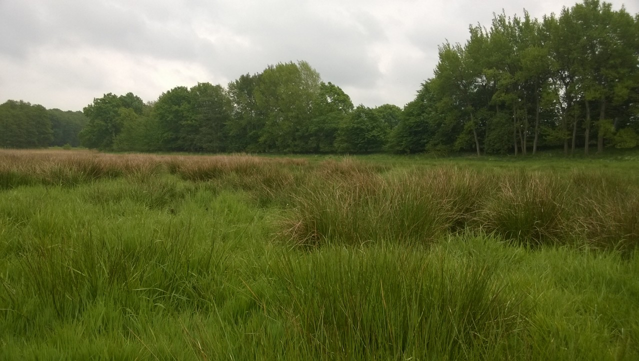 Feuchtwiese im Naturschutzgebiet Pantener Moorweiher